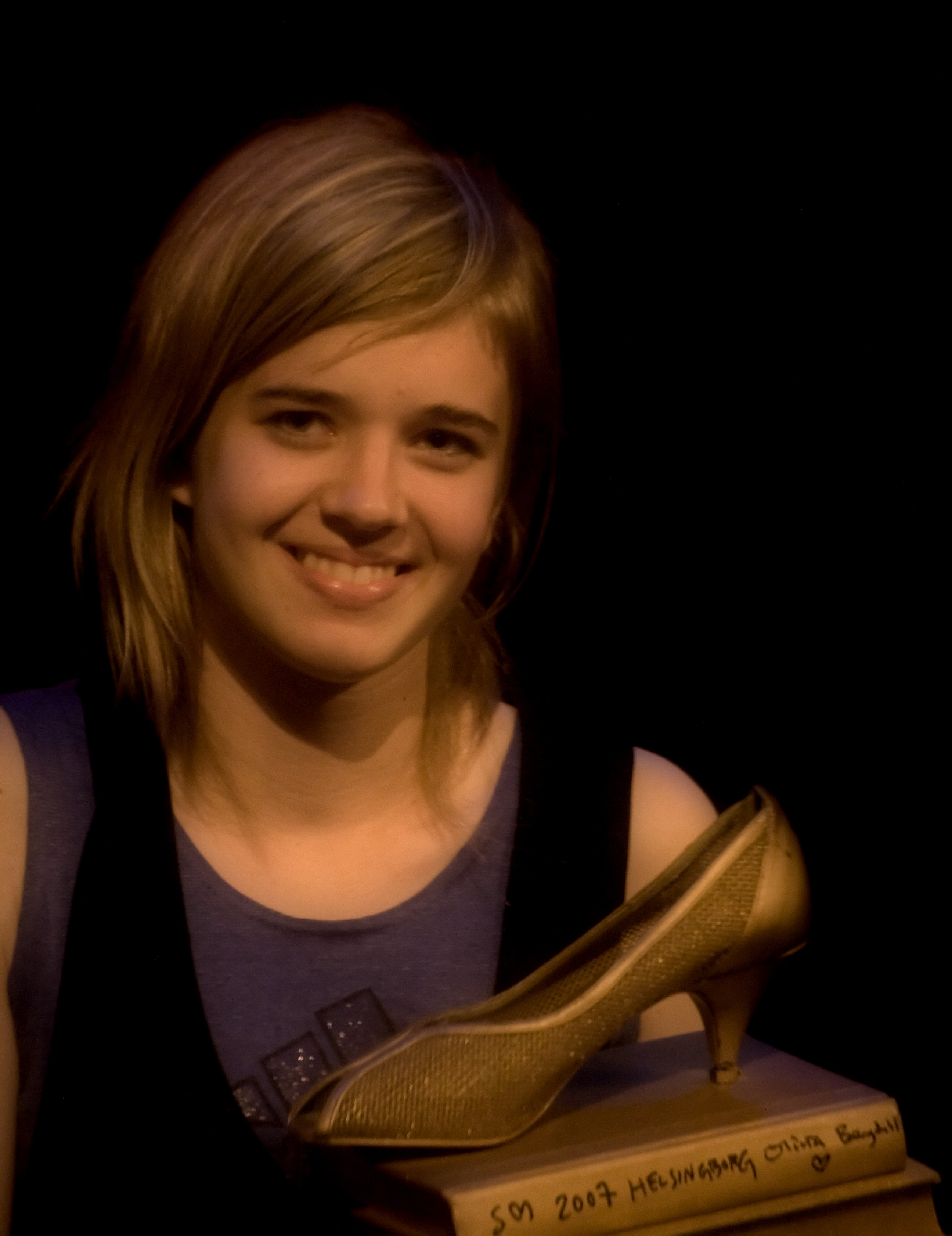 Laura Wihlborg vann SM i Poetry Slam 2008